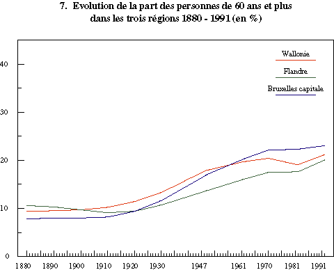 Tableau Bruxelles capitale